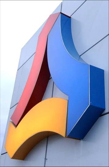 TOBB Ekonomi ve Teknoloji Üniversitesi'nin Logosu.